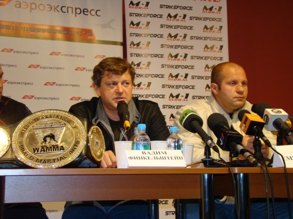 Президент М-1 Global, Вадим Финкельштейн, на пресс-конференции после боя Федора Емельяненко с Бреттом Роджерсом.